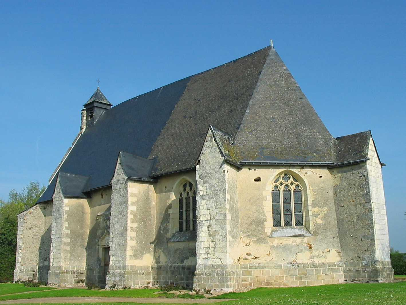 Chapelle Ste Emerance à la Pouëze (49)côté choeur